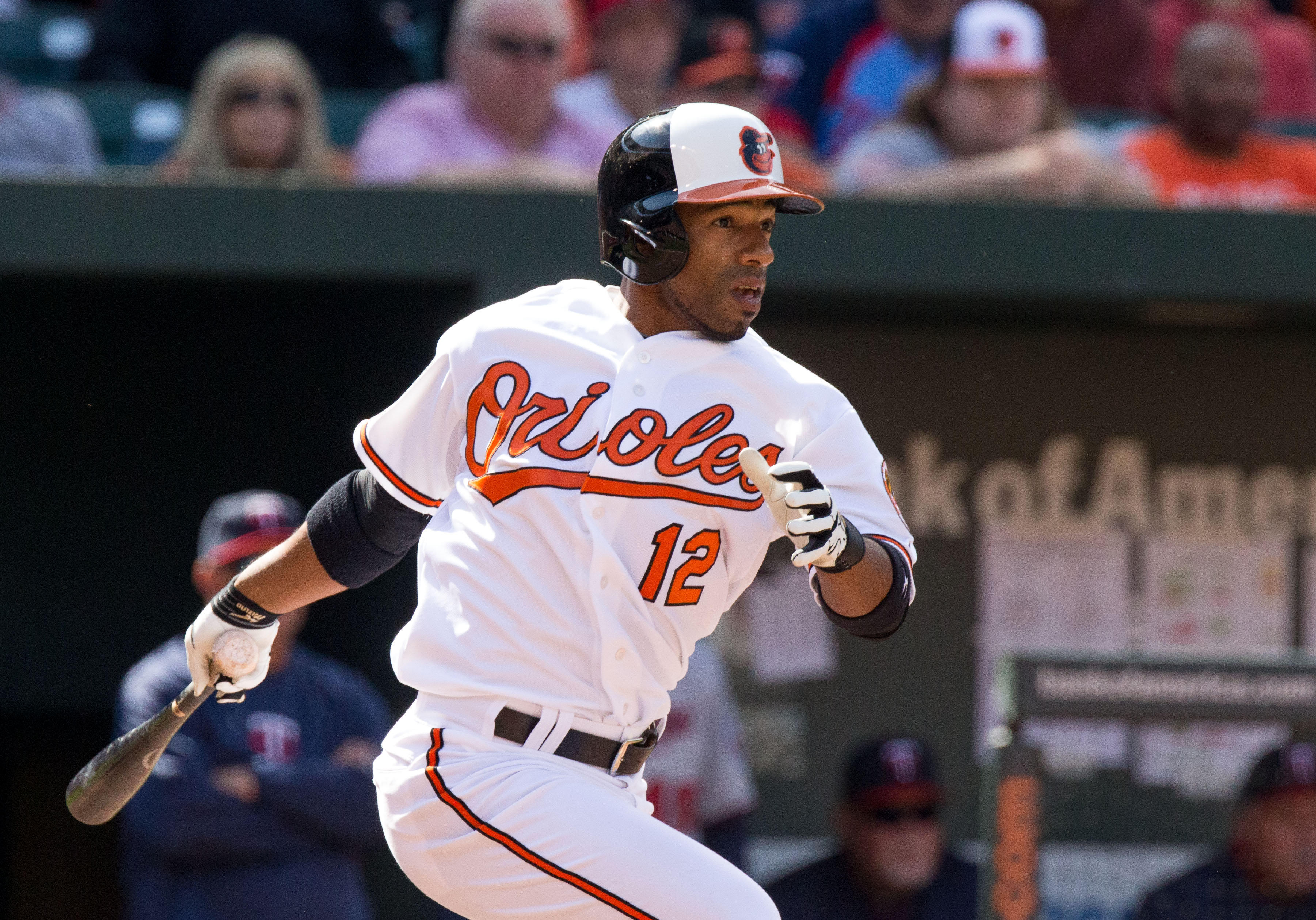 Alexi Casilla